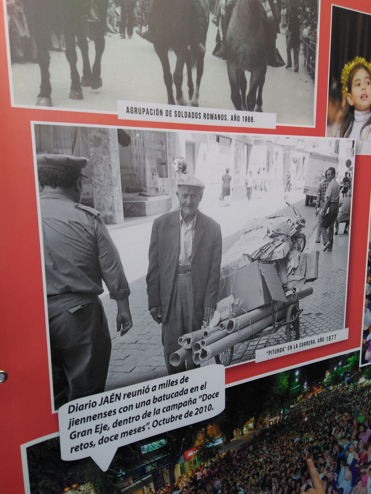 Imagen de Piturda en un panel informativo a cuenta de una iniciativa del Diario Jaén, en la calle Bernabé Soriano, Jaén.